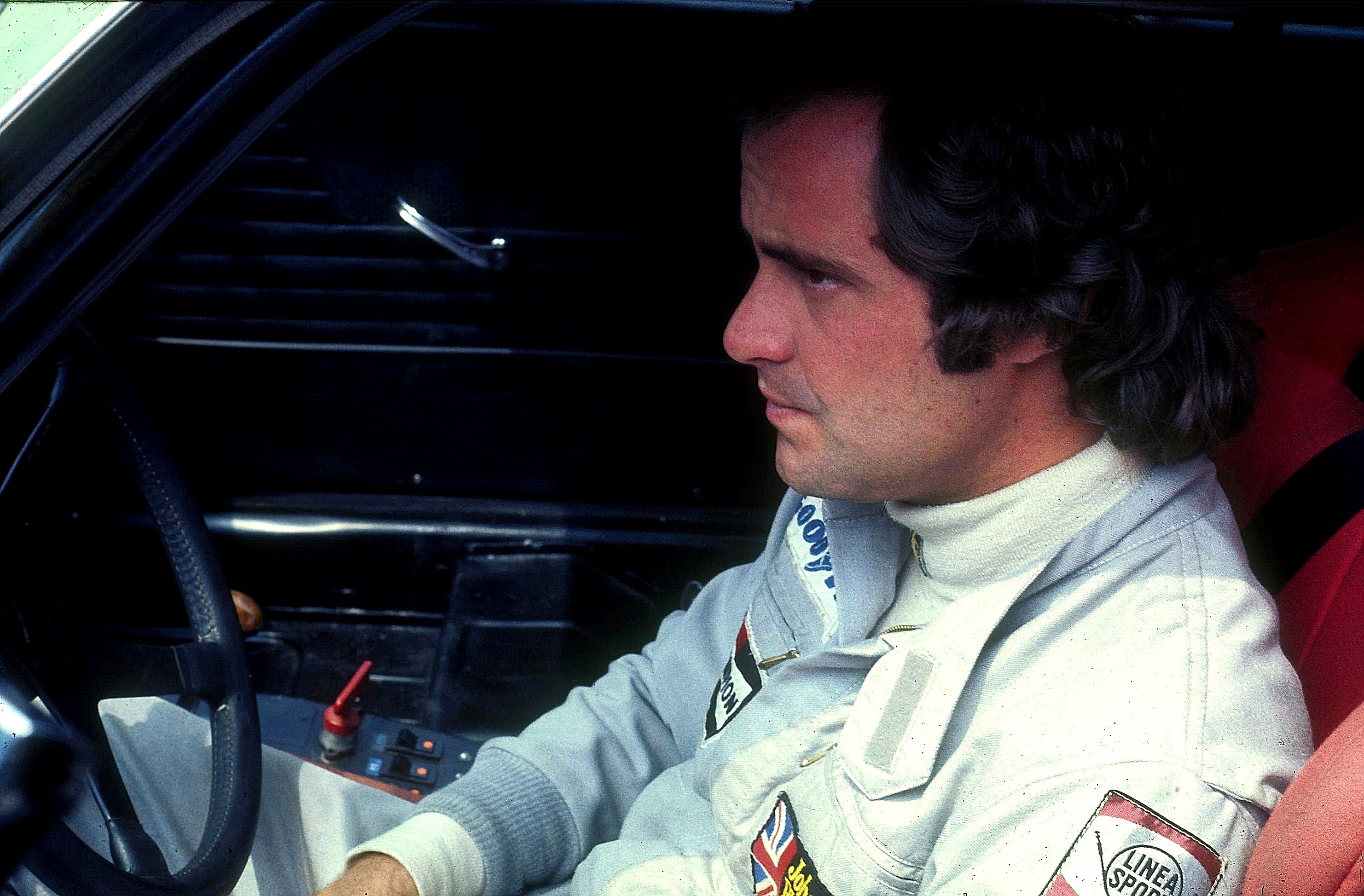 Gunnar Nilsson während des Trainings zum GP der Tourenwagen im Fahrerlager des Nürburgrings. Nilsson gewann das Rennen auf einem BMW CSL des belgischen Luigi-Teams. Er starb am 20. Oktober 1978 in London an einem Krebsleiden.